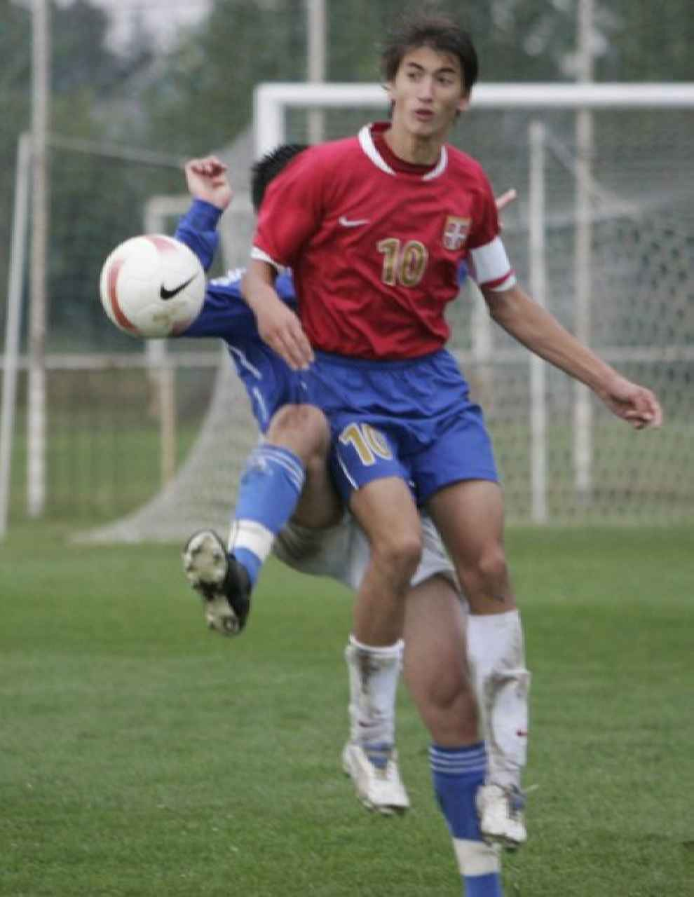 filip djruicic